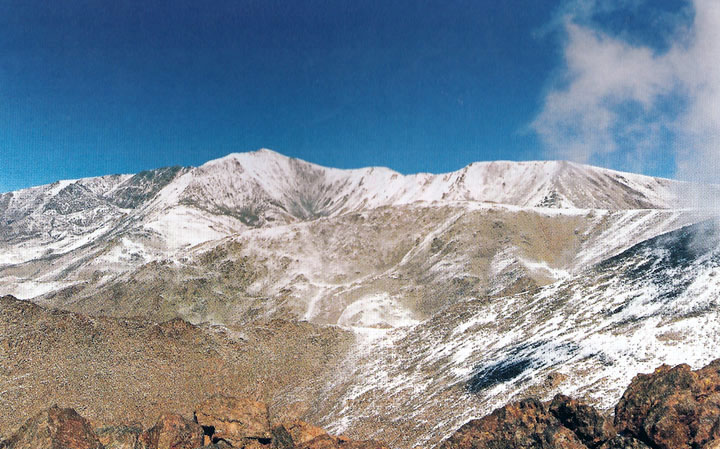 Cerro Chuscha, Cafayate, Salta, Argentina